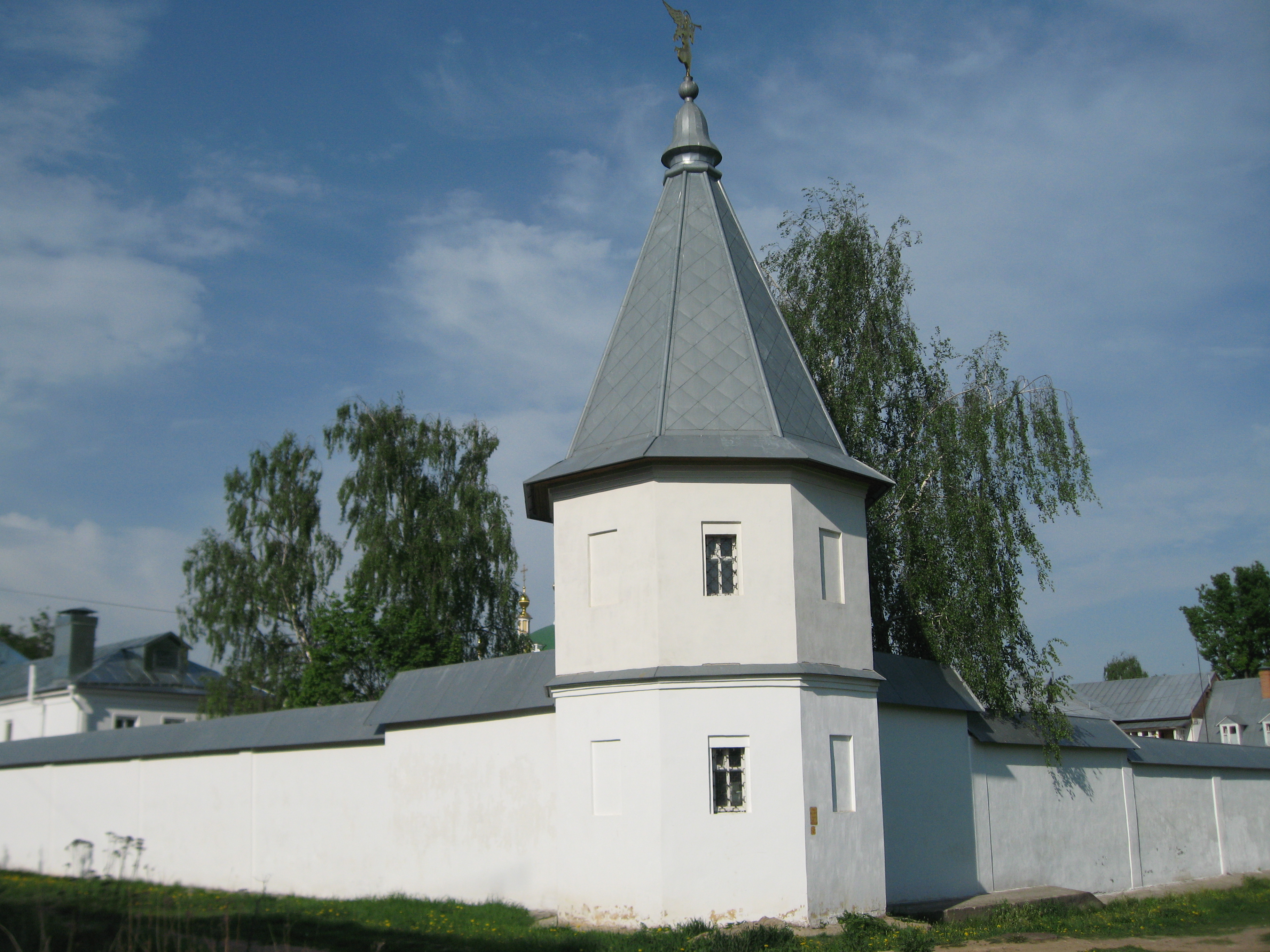 Башни ограды (две) (Москва и Московская область, Ленинск, Петровский проезд)